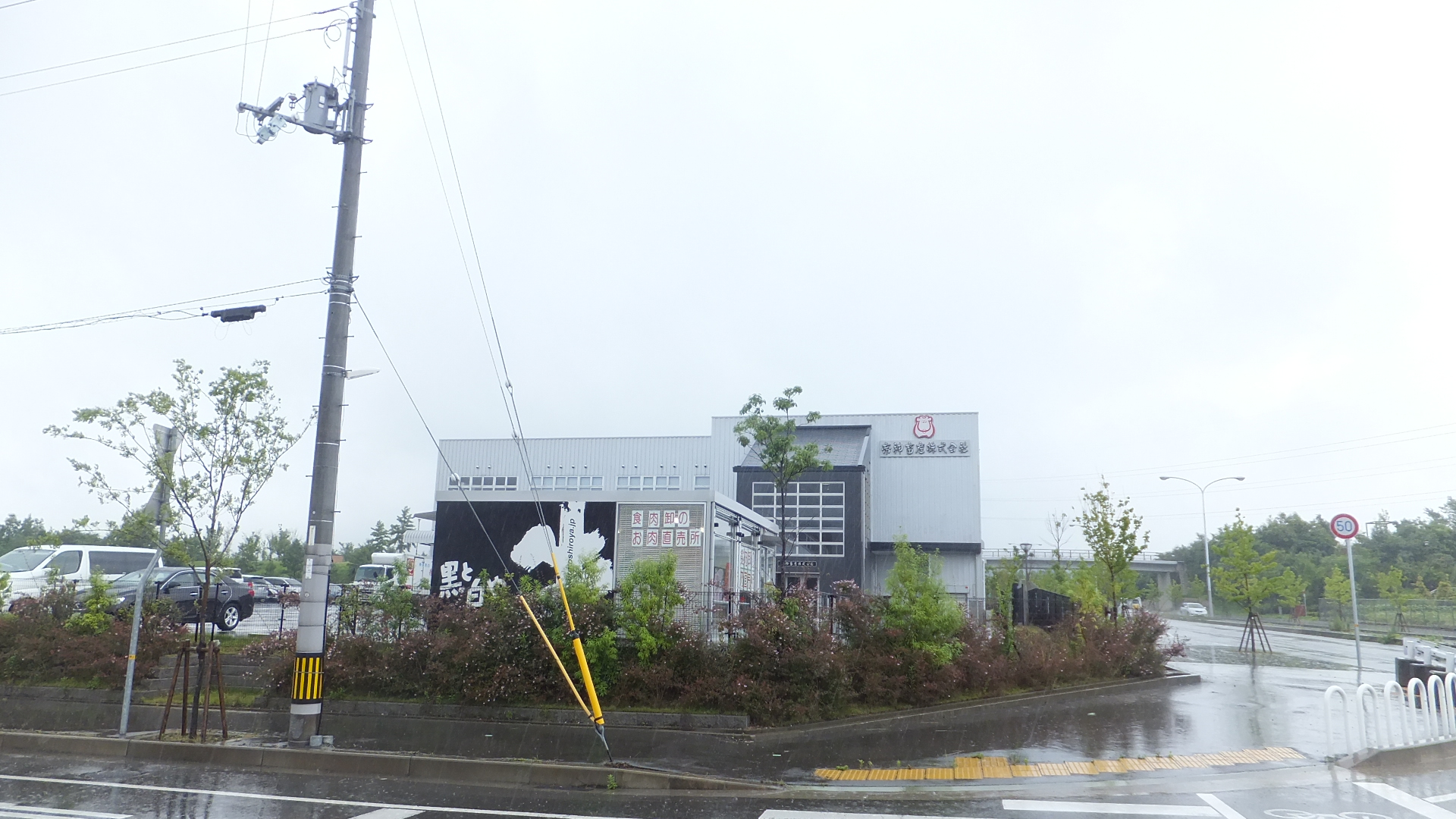 帝神畜産株式会社